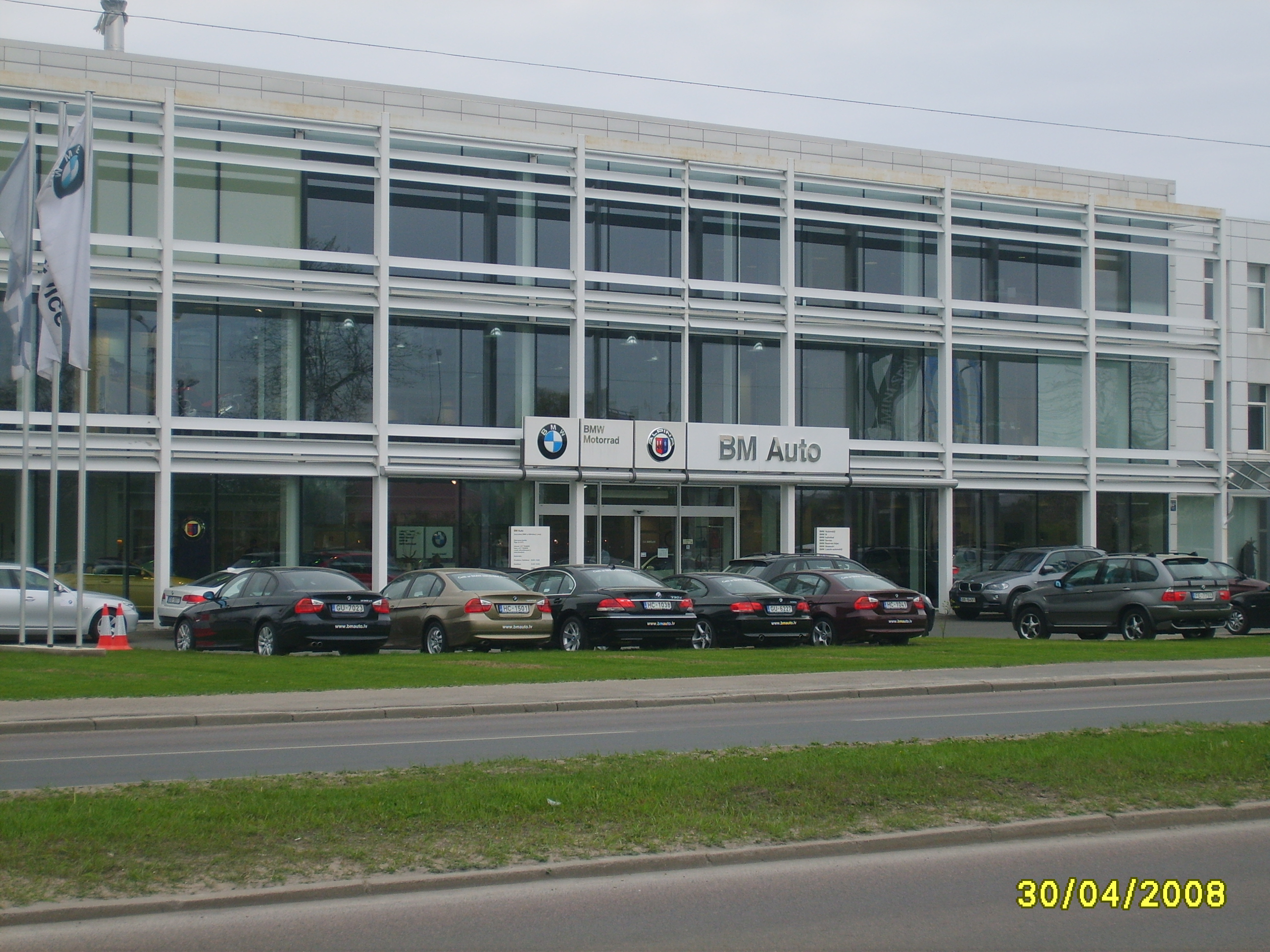 Darzciema 64